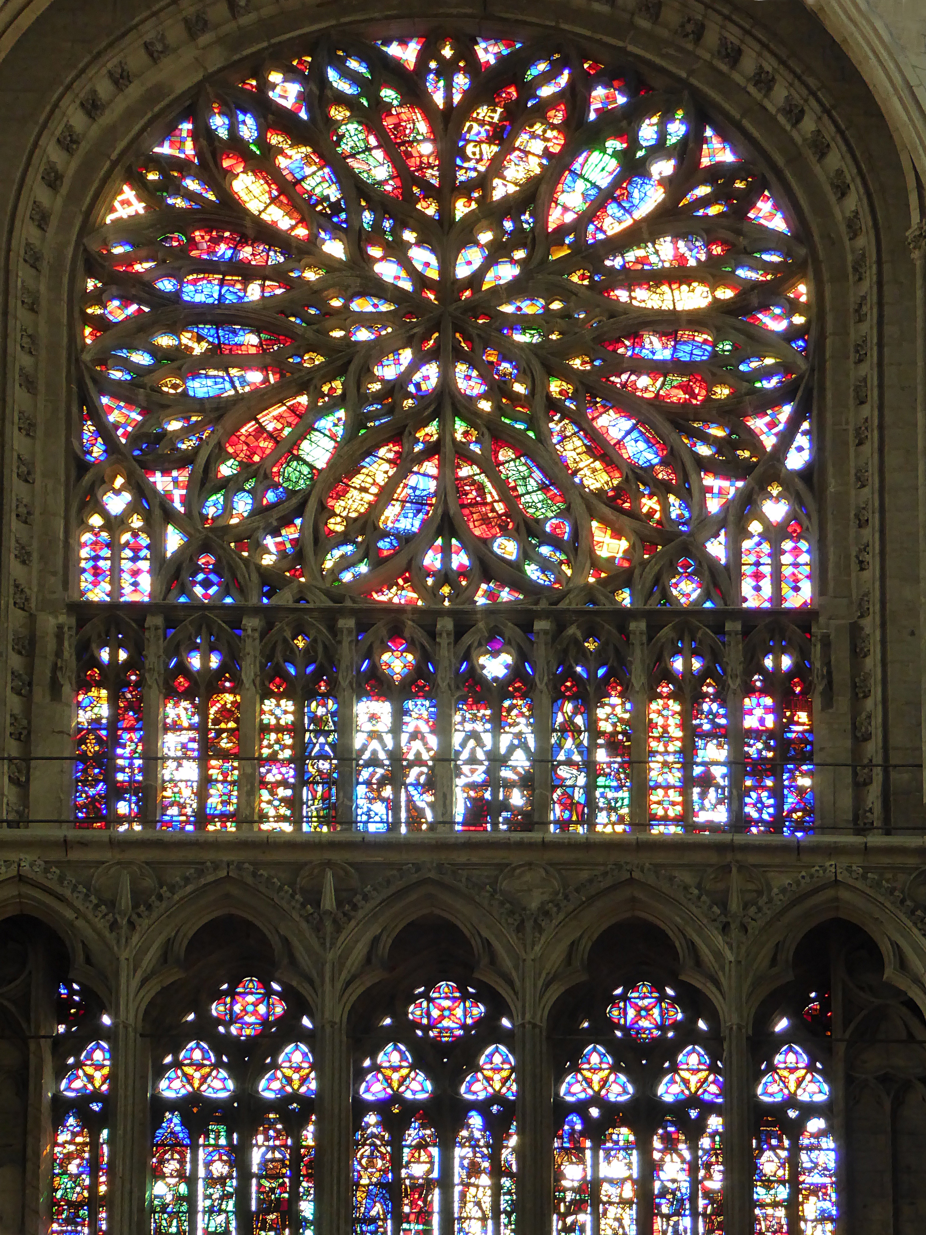 La rose du transept sud (fin XVe-début XVIe siècle), attribuée à Pierre Tarissel, et le triforium de la cathédrale Notre Dame d'Amiens.